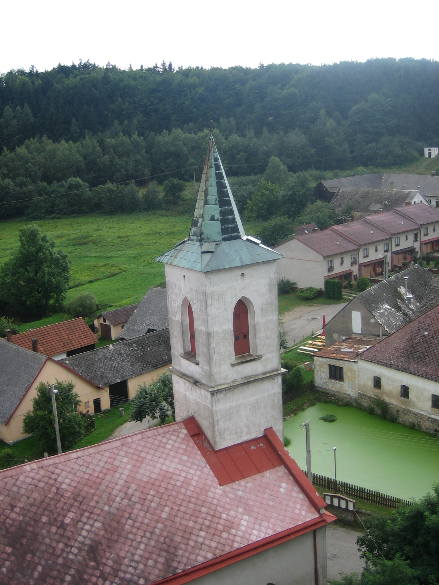 Věž tzv."dolního" kostela